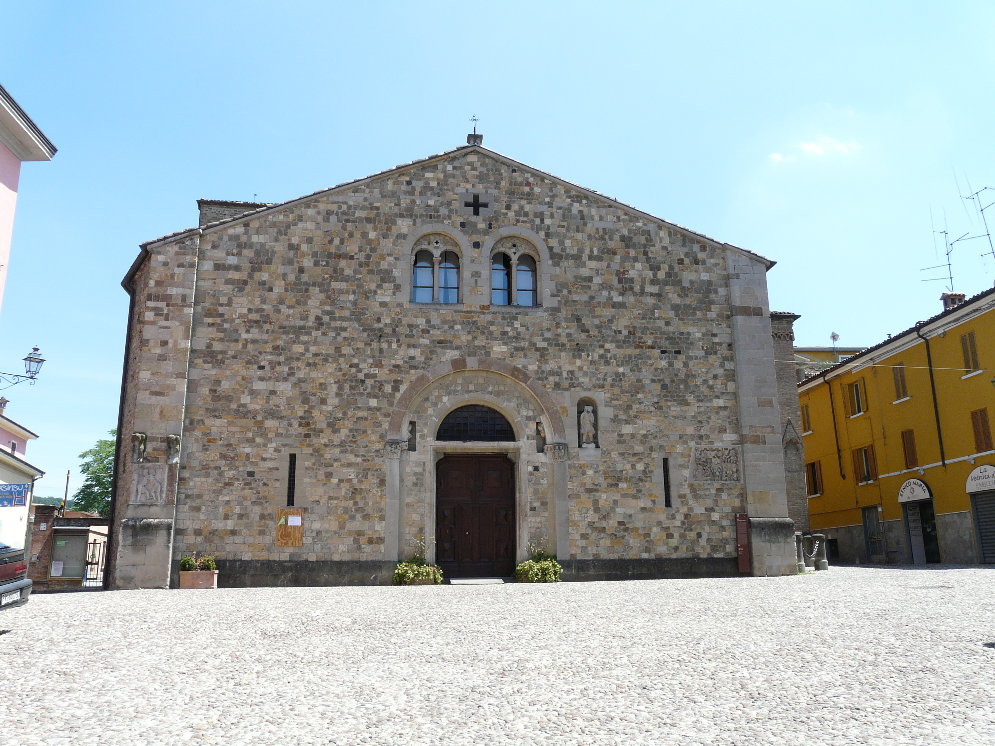 Chiesa dell'Assunzione di Maria Vergine, Fornovo di Taro, Emilia-Romagna, Italia